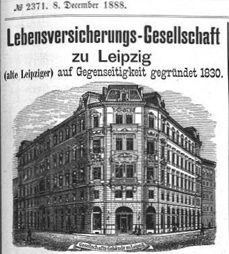 Reklame der Alten Leipziger / Leipziger Versicherungsgesellschaft auf Gegenseitigkeit in der "Illustrirten Zeitung" von 1888 mit dem damaligen Sitz der Firma.